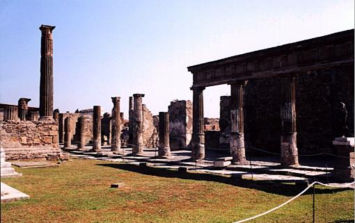 Pompei庞培